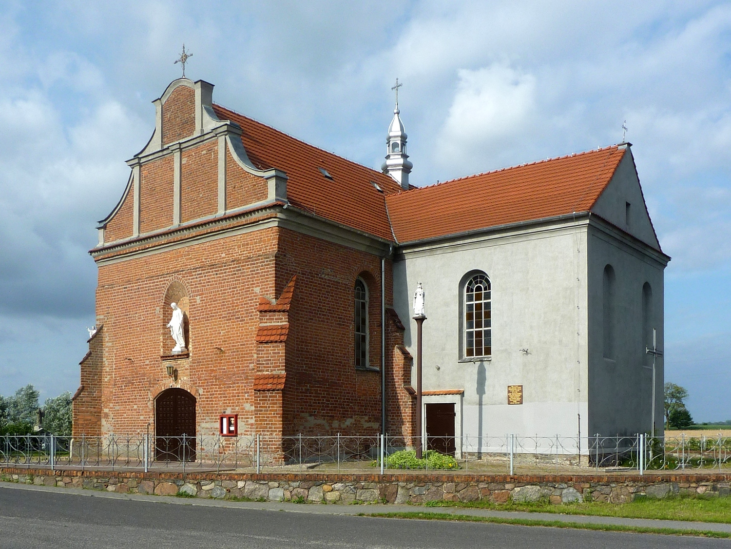 Kościół Wszystkich Świętych w Mielżynie.